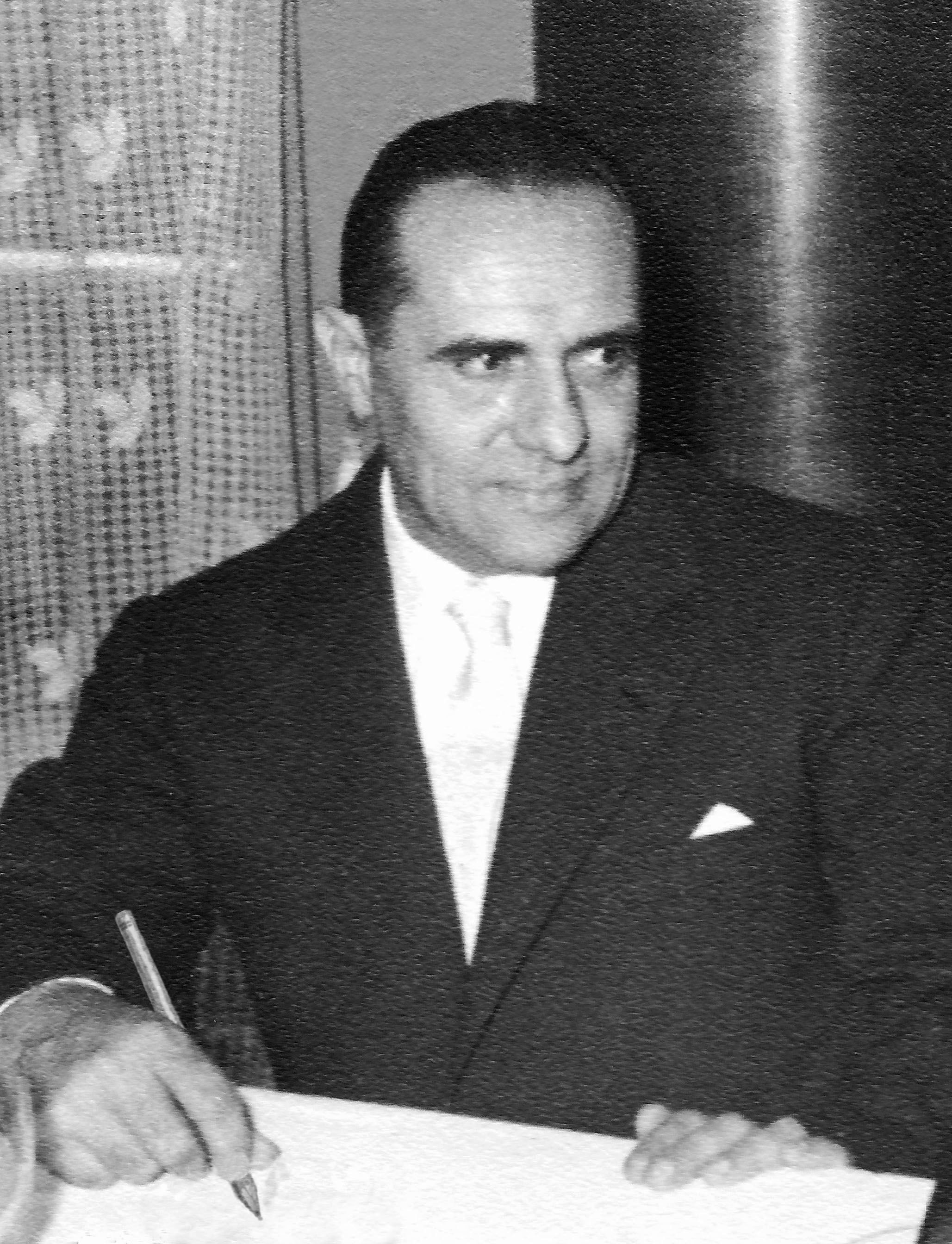 Il pittore Lorenzo Favero intento a disegnare, ripreso a Brescia nel 1970